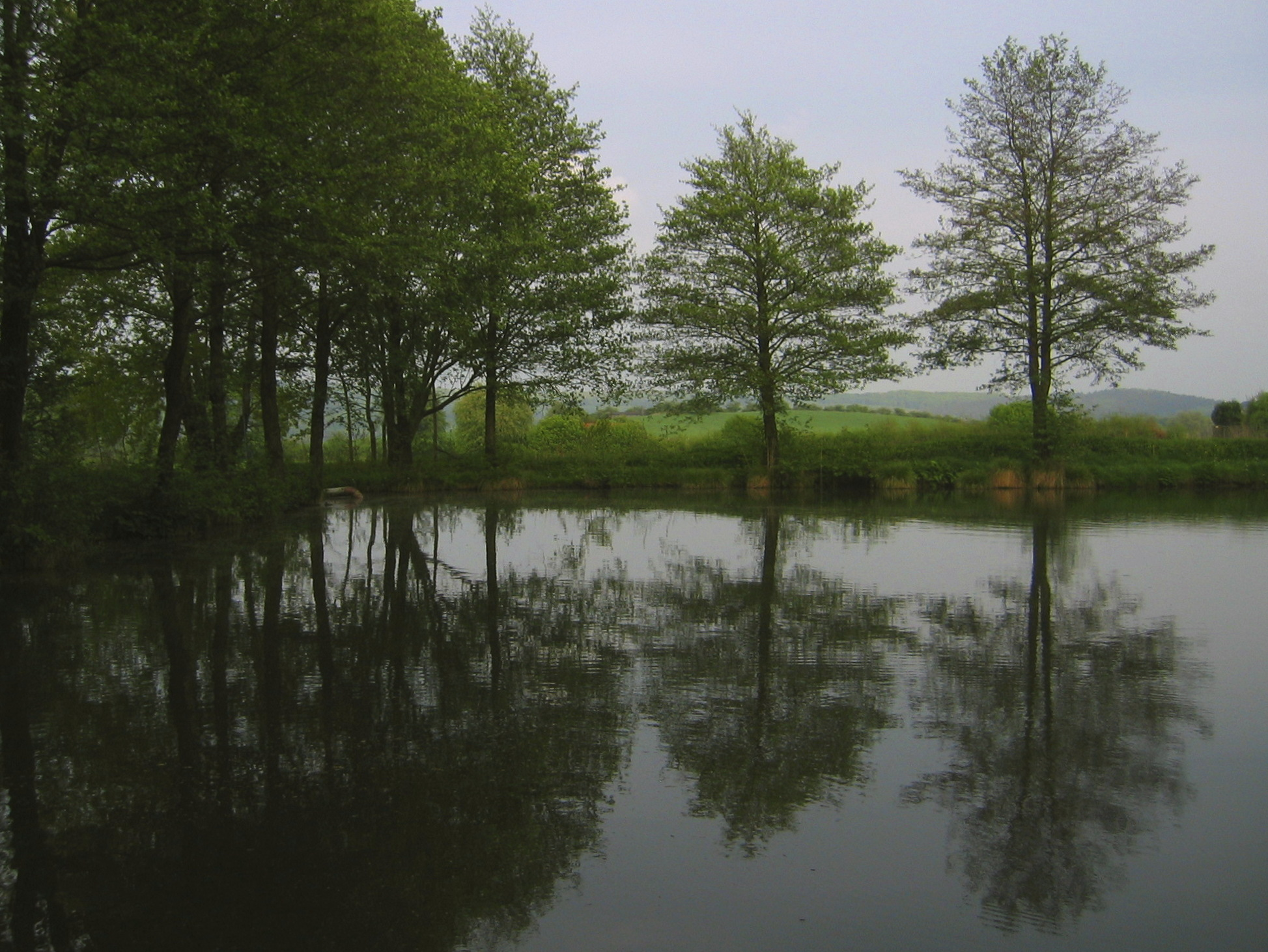 Von Schwarz-Erlen (Alnus glutinosa) umstandener Fischteich (Angelgewässer) im NSG Kiebitzteich, Reelsen, Bad Driburg, Deutschland. Blick nach Osten in Richtung Reelsen.